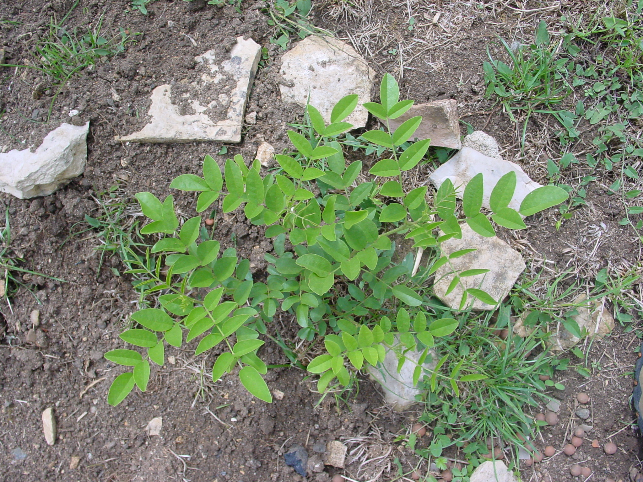 jeansef 2006